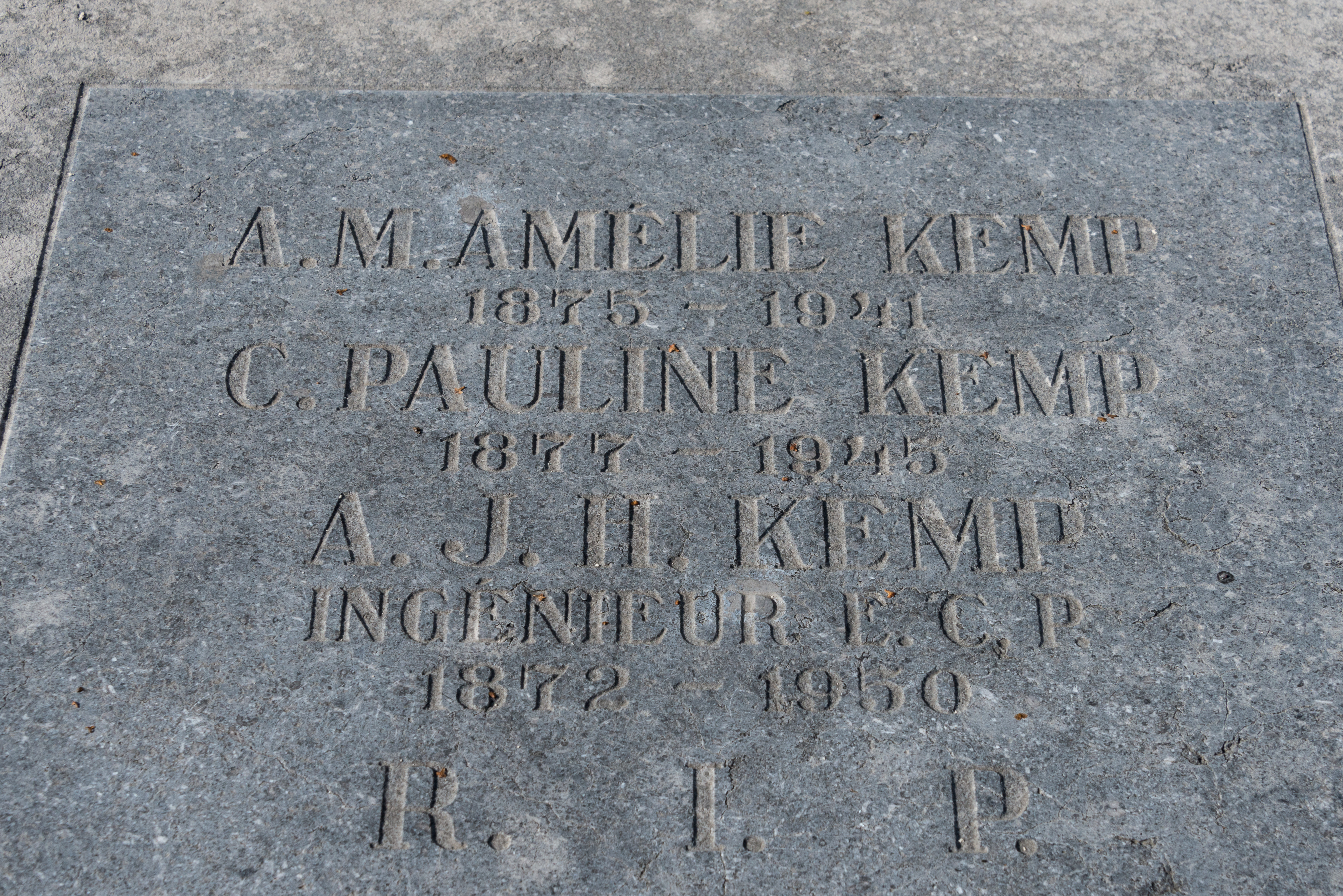 D'Graf vum Pierre an Alphonse Kemp um Nikloskierfecht.